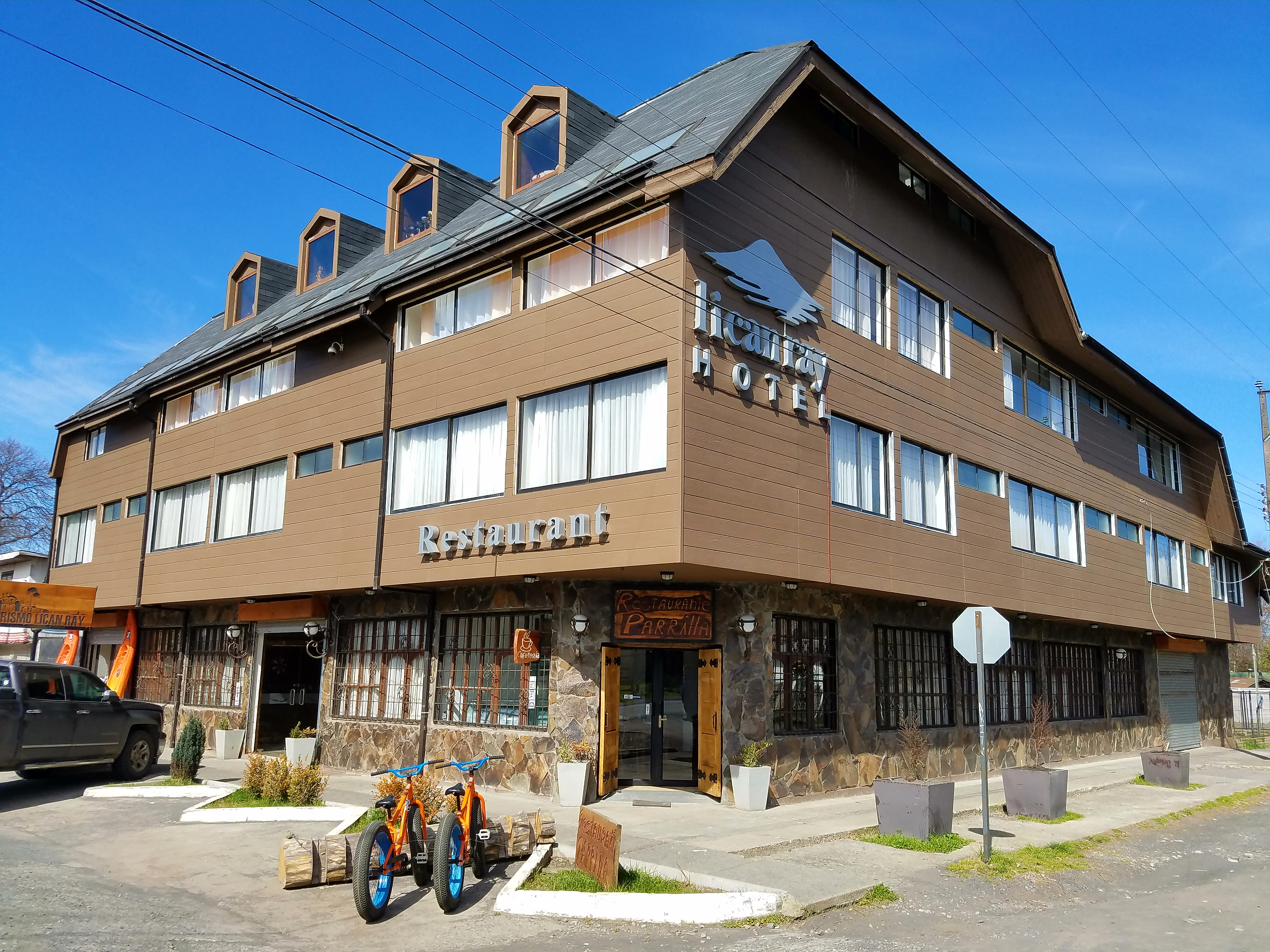 Hotel Lican Ray